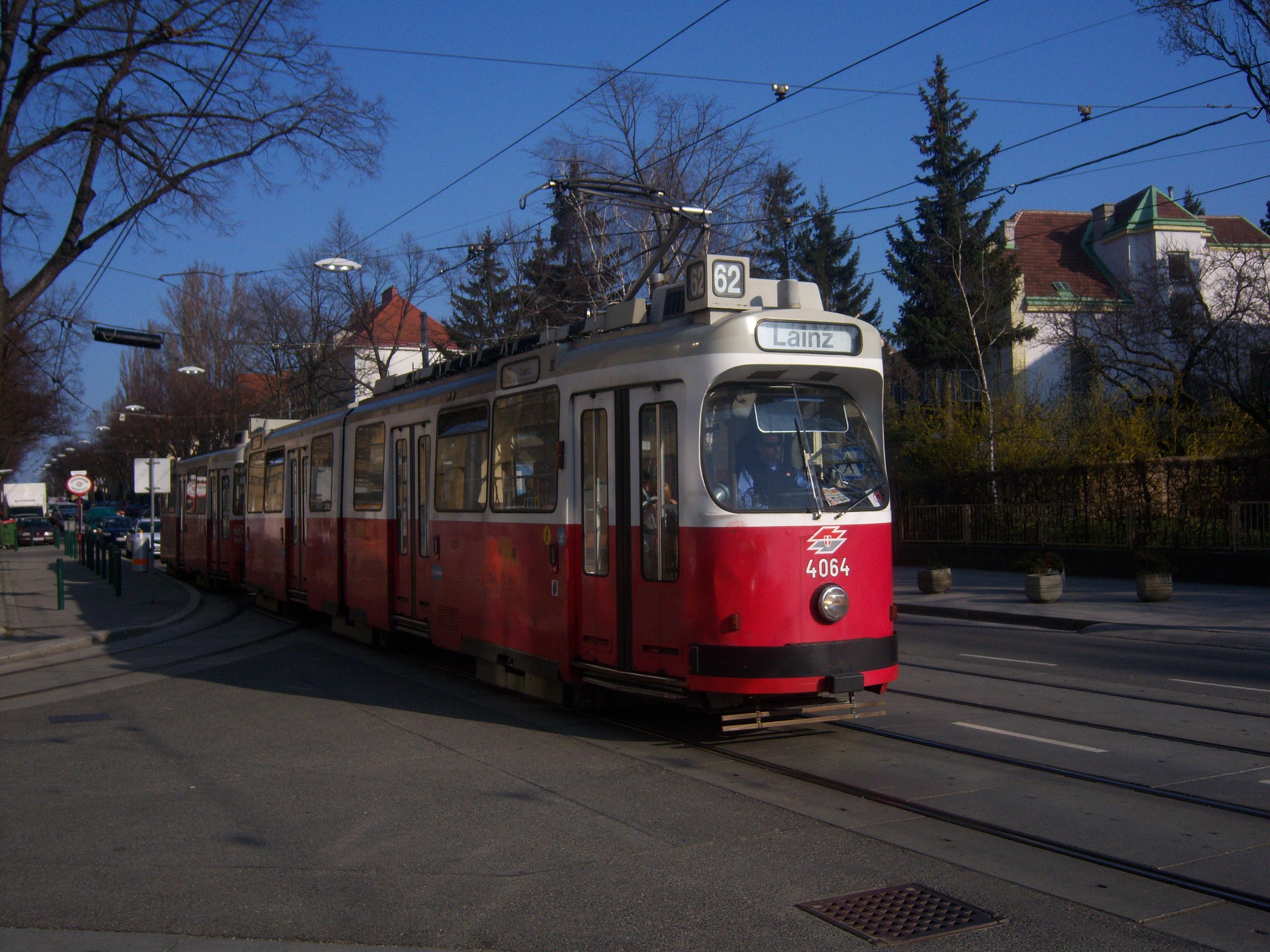 Linie 62 an der Station Wattmanngasse beim Betriebsbahnhof Speising